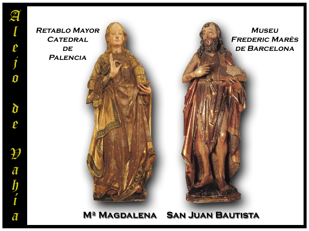 María Magdalena y San Juan Bautista realizadas por el escultor gótico Alejo de Vahía. En el contrato para la creación del retablo mayor de la Catedral de Palencia se puede leer: una de señor Sant Juan Batista y otra de la Madalena, de bulto y madera de nogal bueno sano y limpio, acabadas en perfeçión y puestas en Palencia, todo a su costa solo lo que toca a su ofiçio de ymaginario. Conviene a saber: con sus insynias, e la de Sant Juan en que aya çinco palmos y medio de vara para la parte de la mano yzquierda de la Asunçión en el medio, y la de la Madalena en que aya çinco palmos de vara para la mano derecha de la Asunción en lo alto. A través de la Magdalena de la catedral palentina se ha estudiado todo el estilo de Alejo de Vahía. La pista del San Juan se perdió, pero el historiador de arte Yarza Luaces, cree que el San Juan del Museo Marès de Barcelona es el que correspondería al del encargo de 1505 para la Catedral de Palencia.